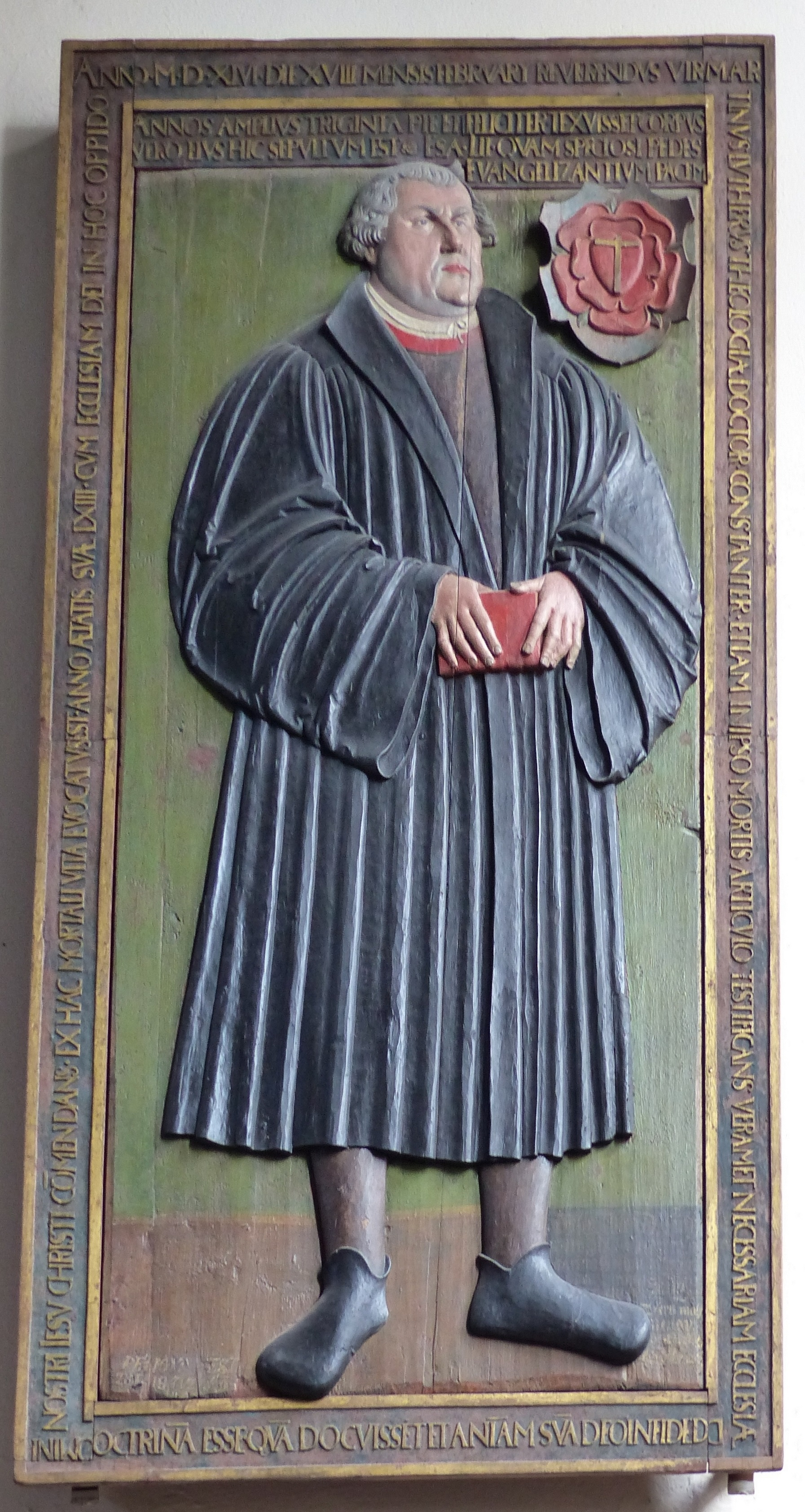 Andreaskirche Erfurt, Holzmodell des Luther-Epitaphs